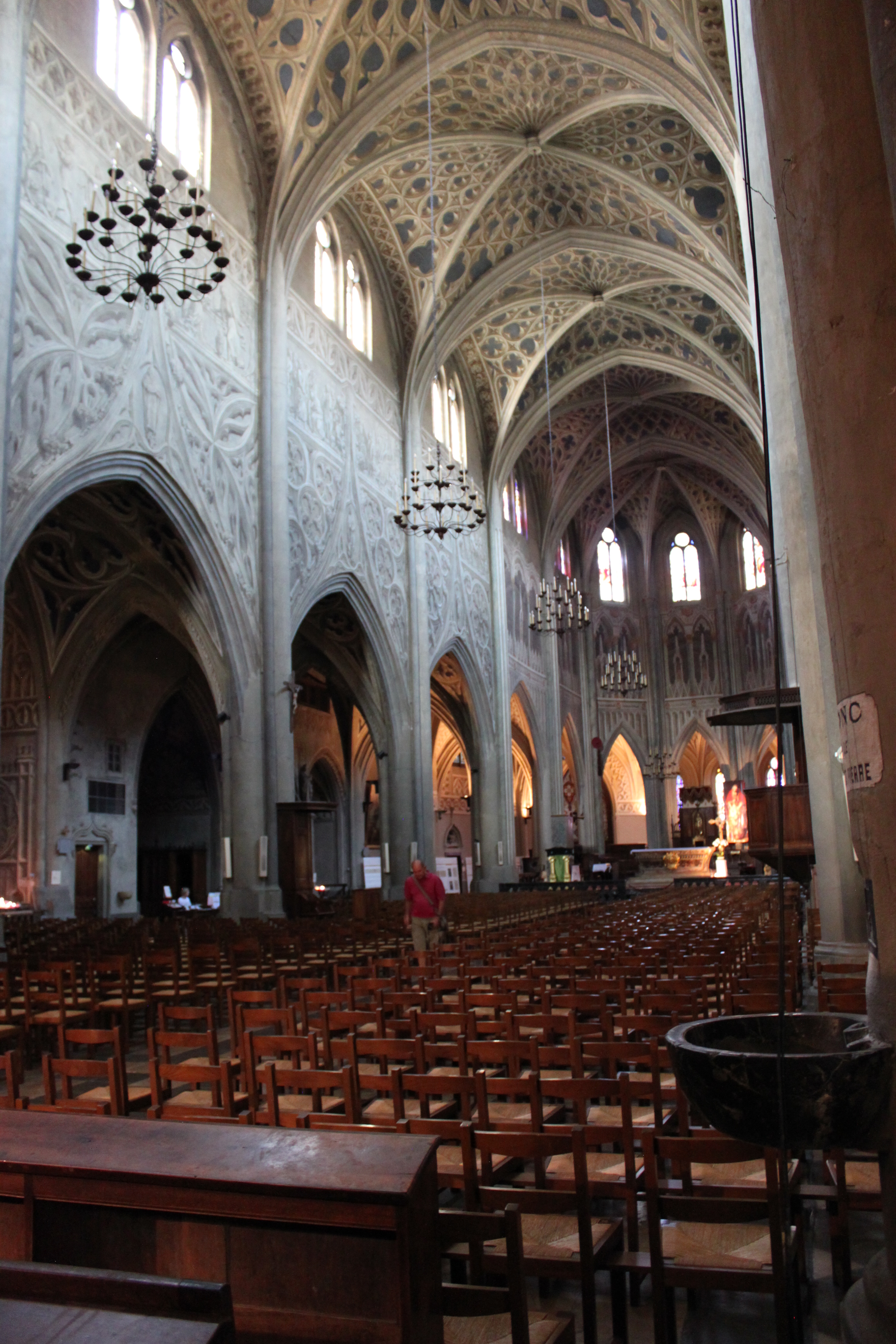 Chambéry, France